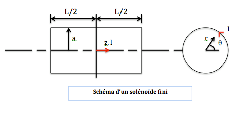 Schéma d'un solénoide fini pour illustrer le calcul du champs magnétique